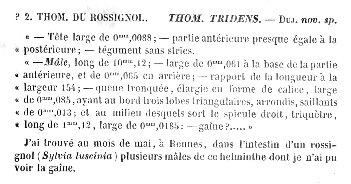 Thominx tridens Dujardin, 1845 - diagnosis